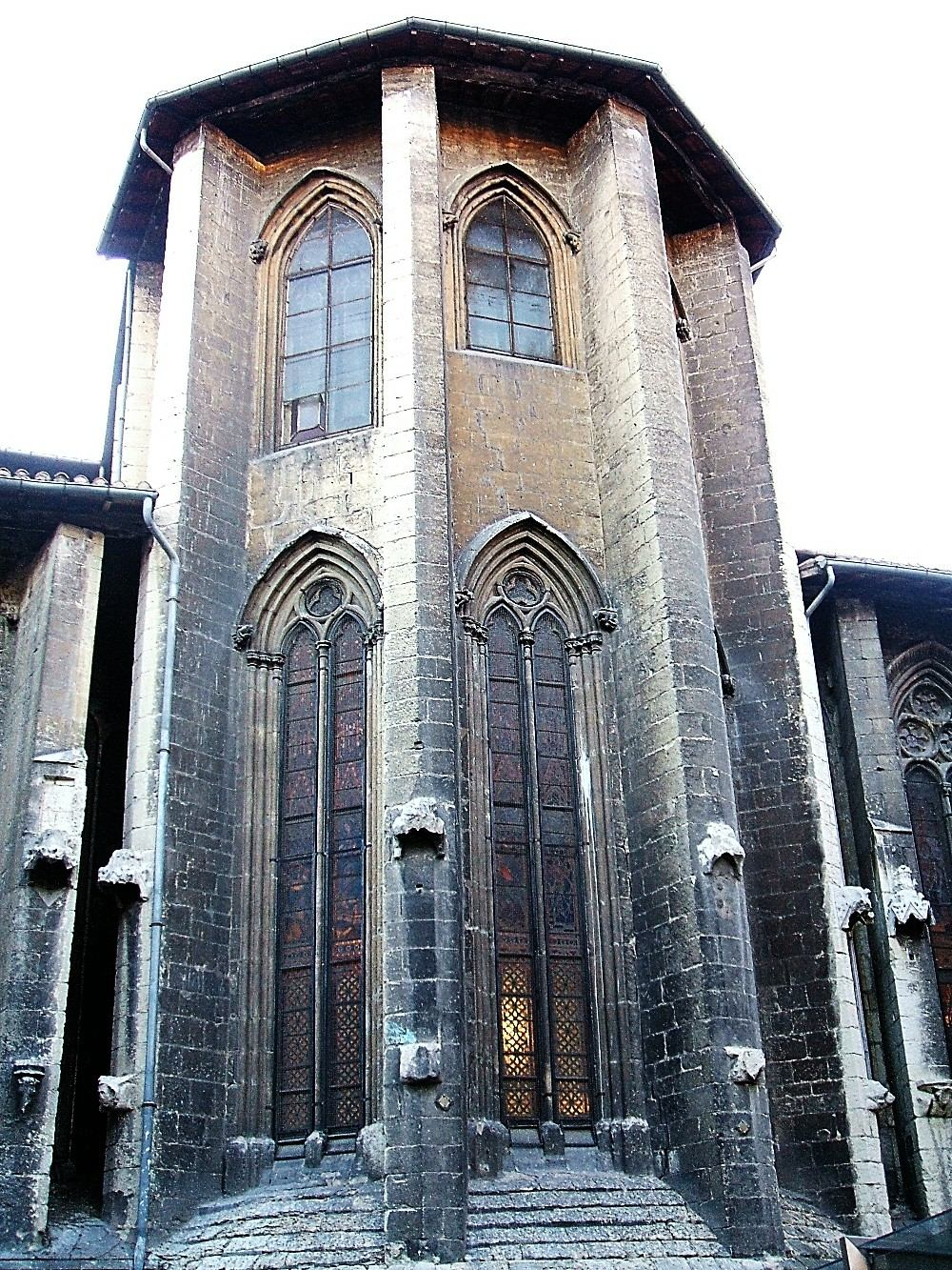 Iglesia de San Pedro Apóstol, Vitoria-Gasteiz